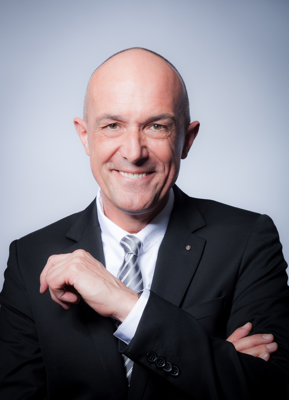 Porträt Klaus Metzger